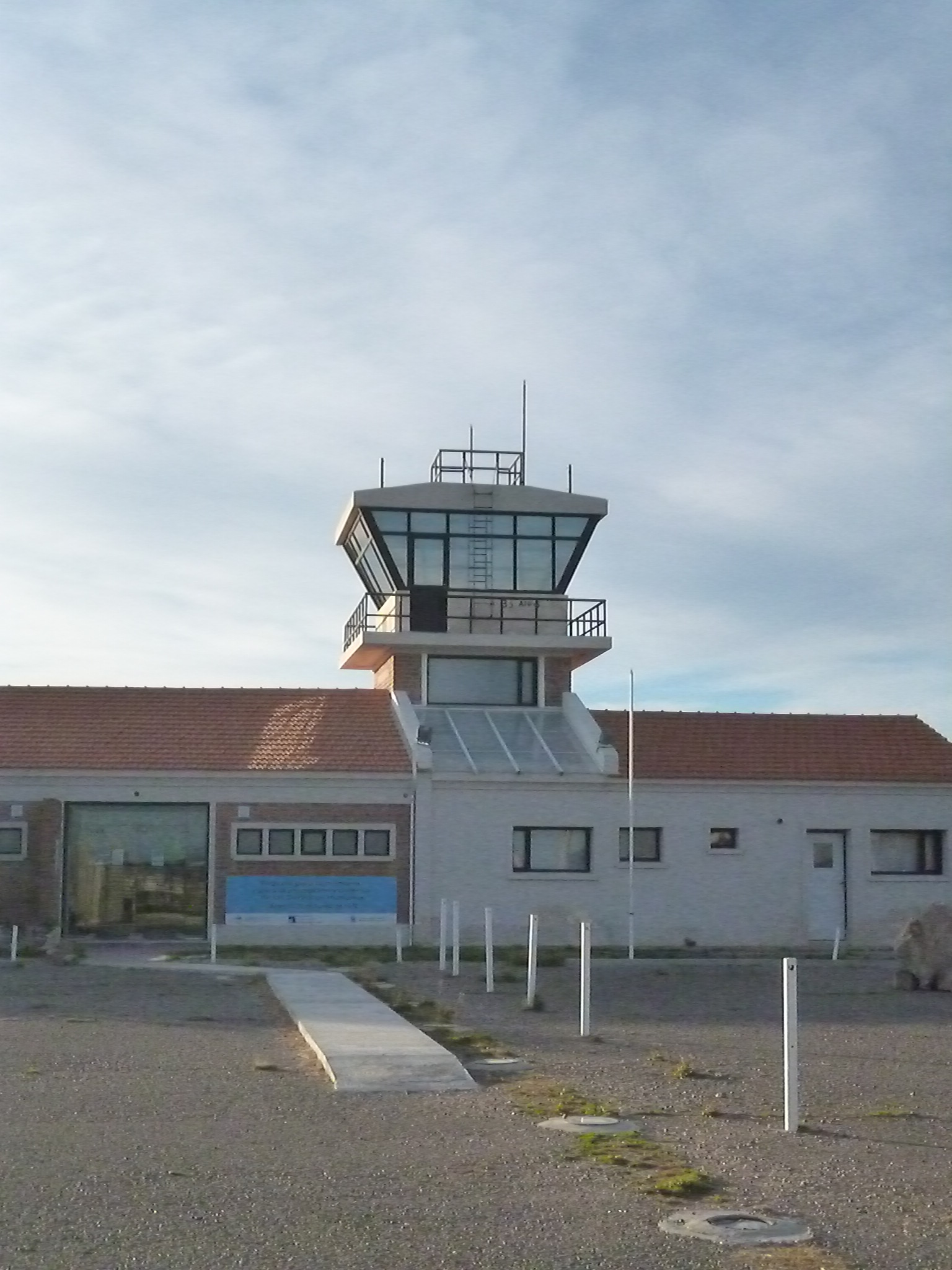 Aeropuerto Viejo de Trelew, actual Centro Cultural por la Memoria. Funcionó como terminal aérea entre 1938 y 1979, cuando fue reubicado. El 15 de agosto de 1972, 110 prisioneros políticos se fugaron del penal de Rawson y tomaron un BAC 1-11 de Austral que se dirigía a Buenos Aires, para dirigirse primero a Chile y después a Cuba. Los planes fallaron y 19 de ellos, que no lograron escaparse, decidieron tomar el edificio. Una patrulla militar bajo las órdenes del capitán de corbeta Luis Emilio Sosa, condujo a los prisioneros recapturados a la Base Aeronaval Almirante Zar. Allí fueron fusilados el 22 de agosto, en lo que se conoce como "Masacre de Trelew".